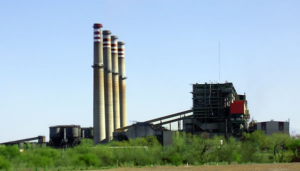 Central Termoeléctrica Rio Escondido(CTRE), ubicada en las afueras de la cidad de Piedras Negras, municipio de Nava, Coah. sobre la carretera 57. A un lado de esta se construyó la Central Termoeléctrica Carbón II. Ambas plantas utilizan el carbón extraído de las minas que existen alrededor. Actualmente producen cerca del 10% de la electricidad del país. Foto tomada el 2 de Enero de 2006. Manuel Velez.